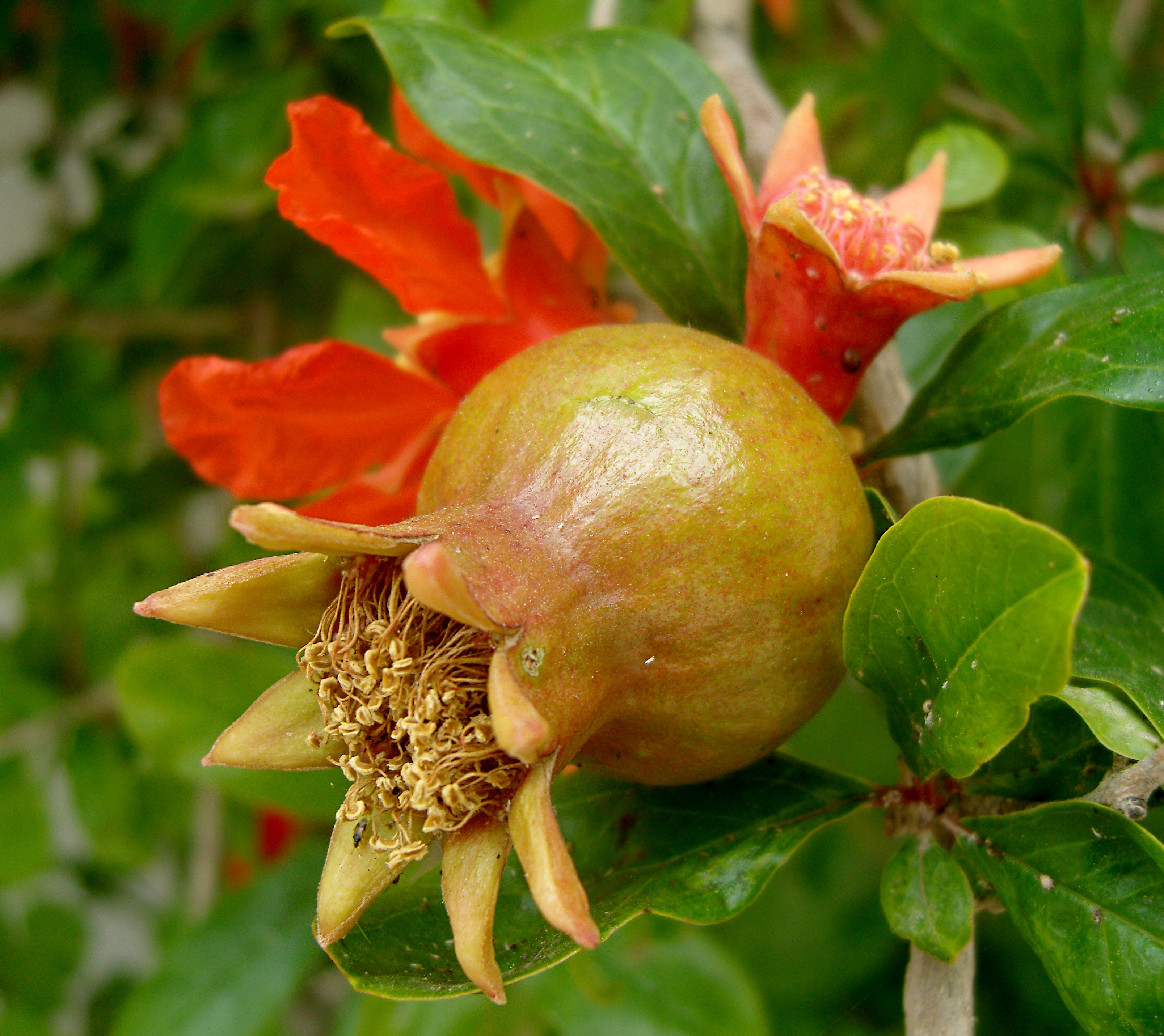 Jeune fruit de Punica Granatum cachant une fleur